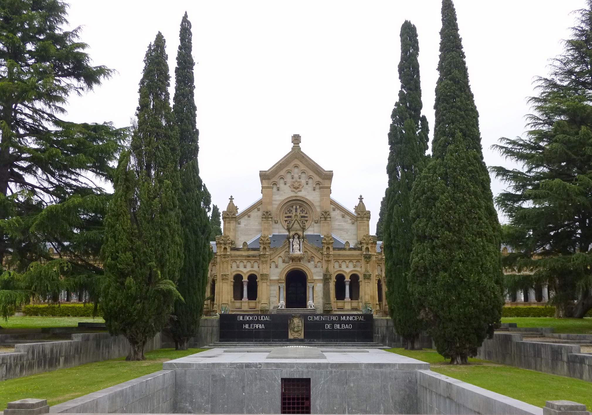 Cementerio de Bilbao, en Derio (Bizkaia)